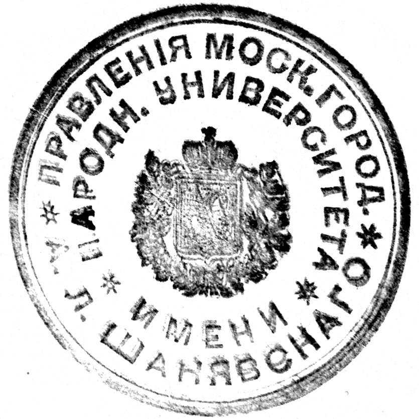 Печать Московский городской народный университет имени А. Л. Шанявского